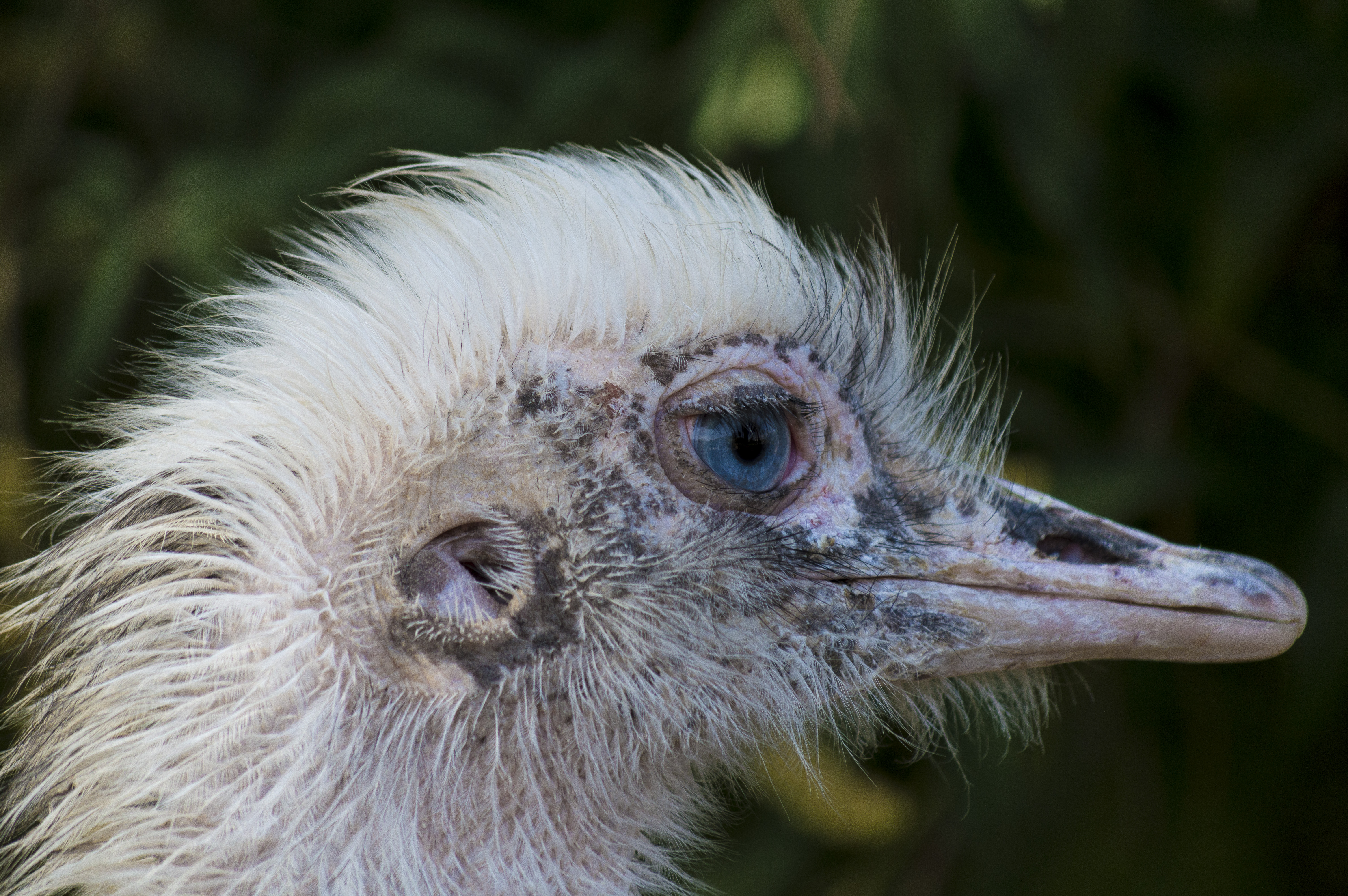 Détail sur la tête d'une autruche du Parc Phoenix de Nice